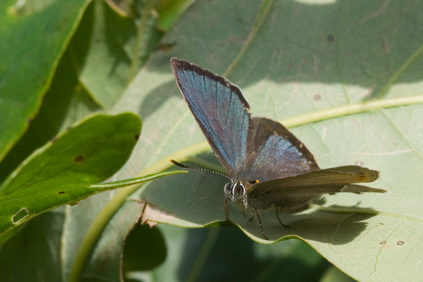 Neozephyrus quercus